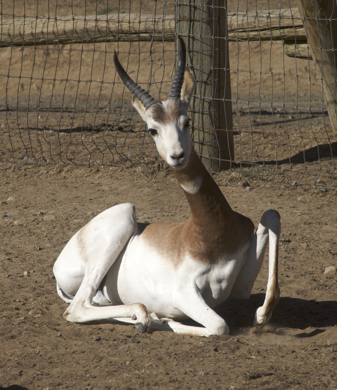 Gazella dama Dama Gazelle